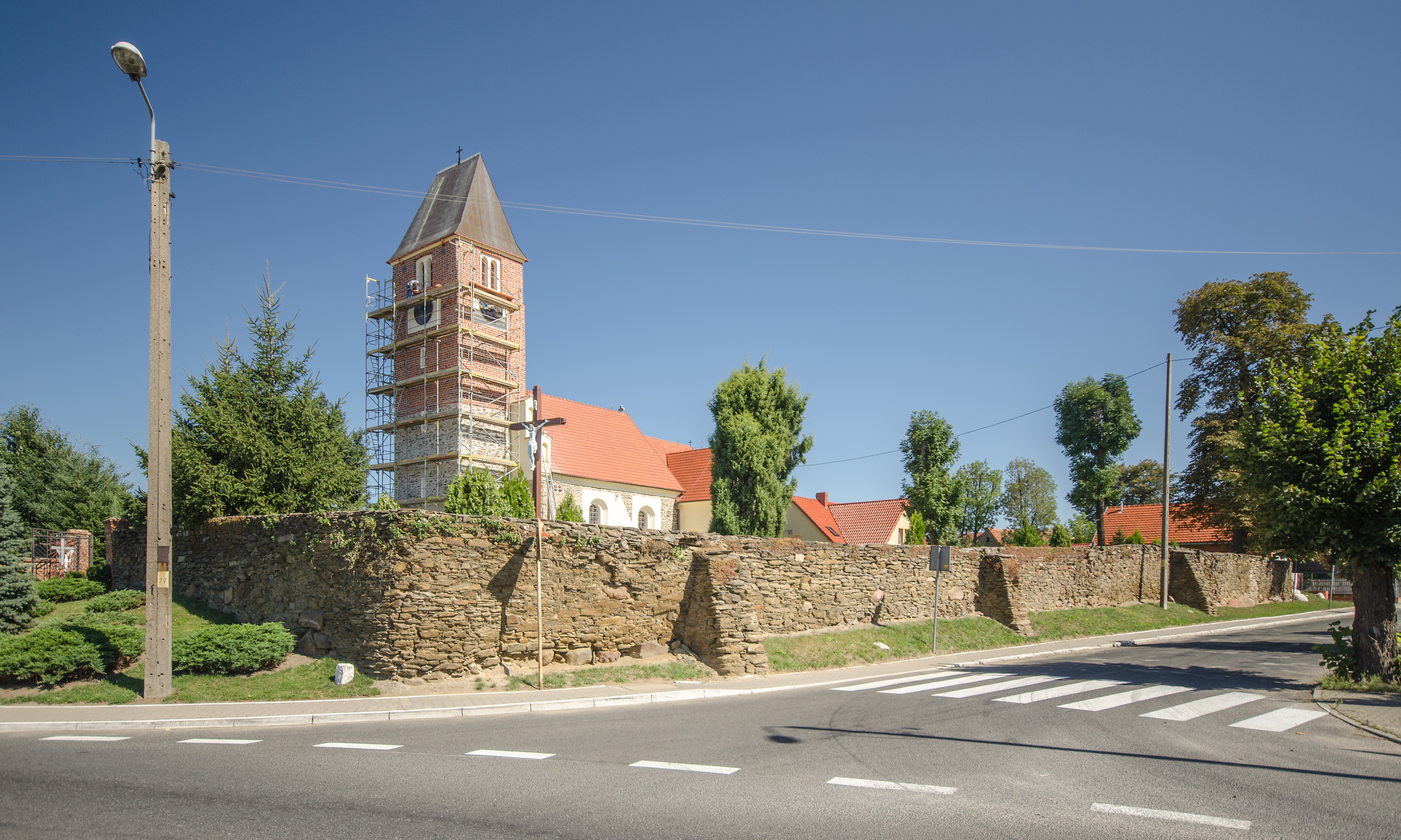 Cesarzowice - mur obronny cmentarza, 1 poł. XVII